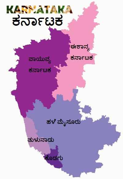 ಕನ್ನಡ: ಕರ್ನಾಟಕ